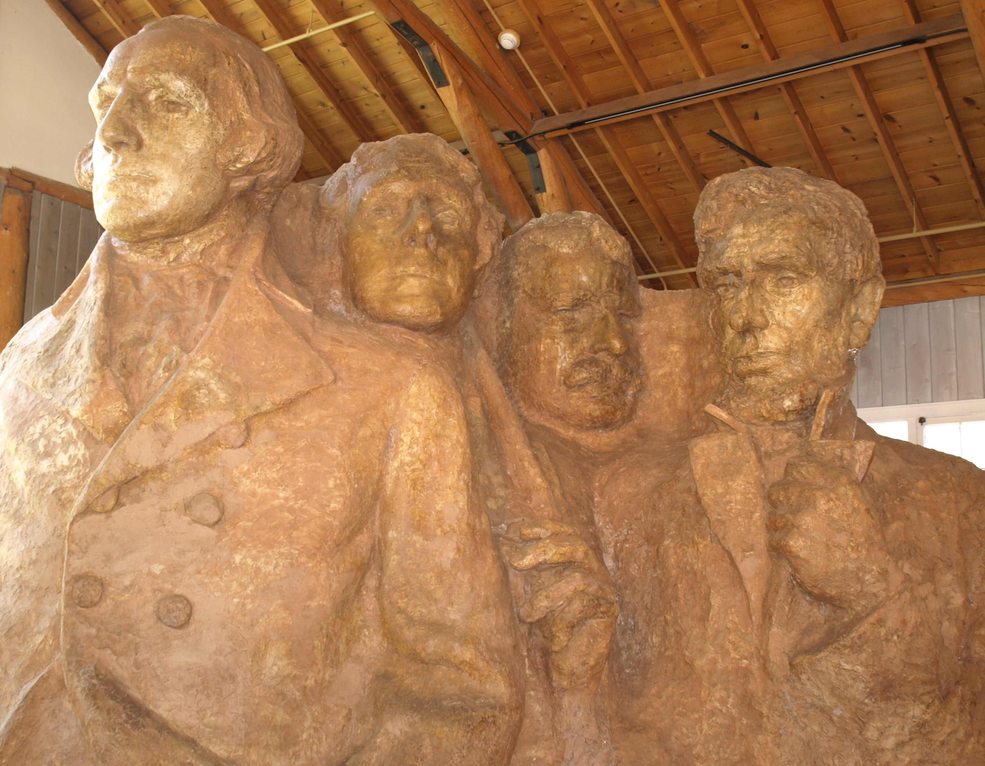 Les sculptures monumentales du Mont Rushmore dans la version prévue par Gutzon Borglum et photographiées dans l'atelier du sculpteur.